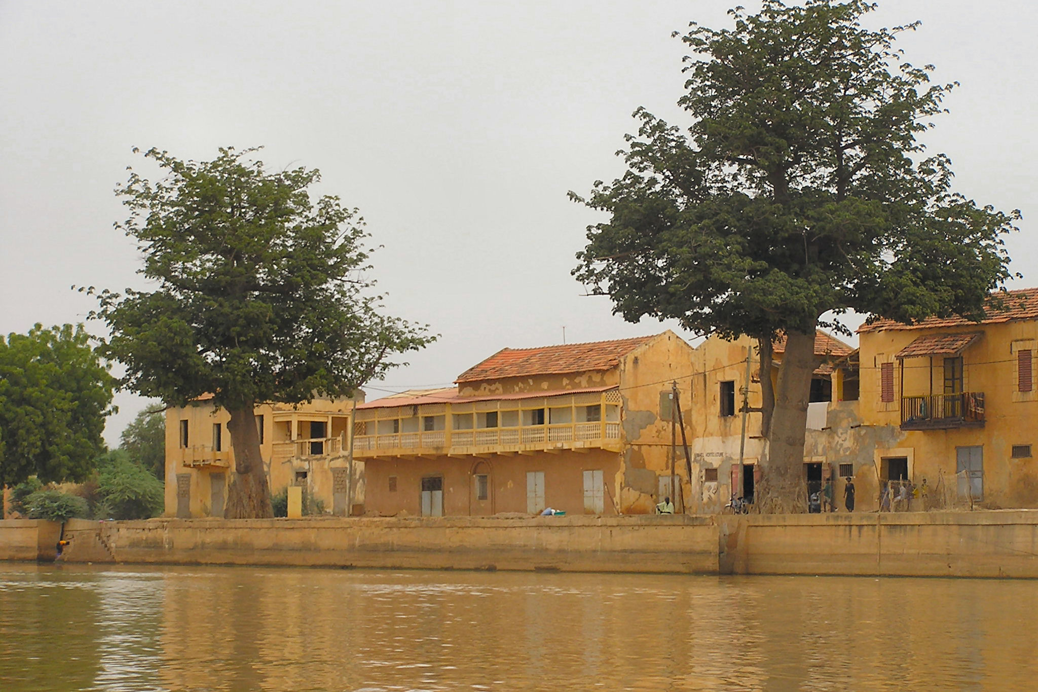 Le comptoir de Dagana (Sénégal)